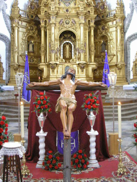 El Cristo de la Agonía expuesto en besapiés el día de su Festividad, tercer domingo de Cuaresma